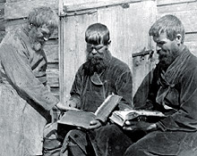 Бухтарминские каменщики. Дореволюционная фотография.